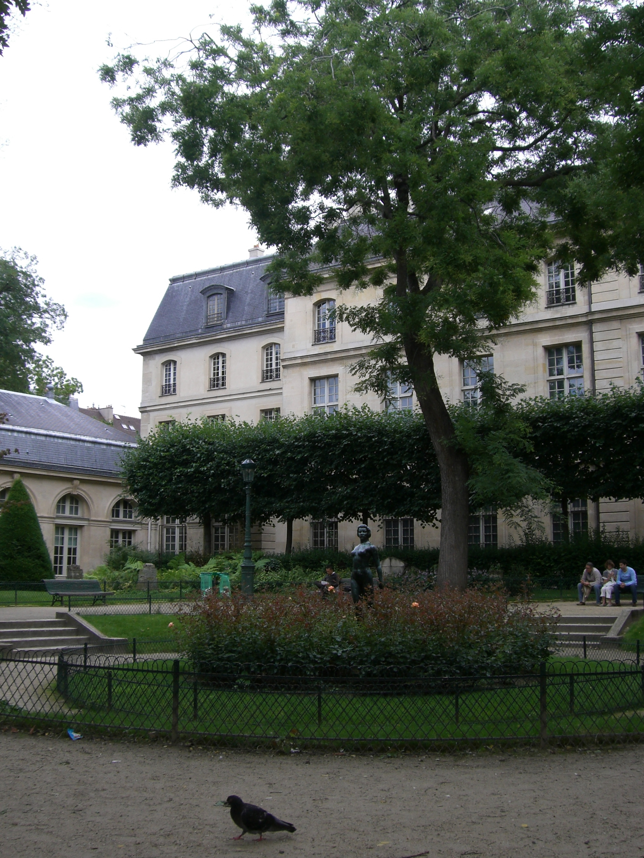 Aristide Maillol: Île-de-France, statue de femme émergeant du massif de fleurs central du Square Georges-Cain, IIIe arrondissement, Paris, France.